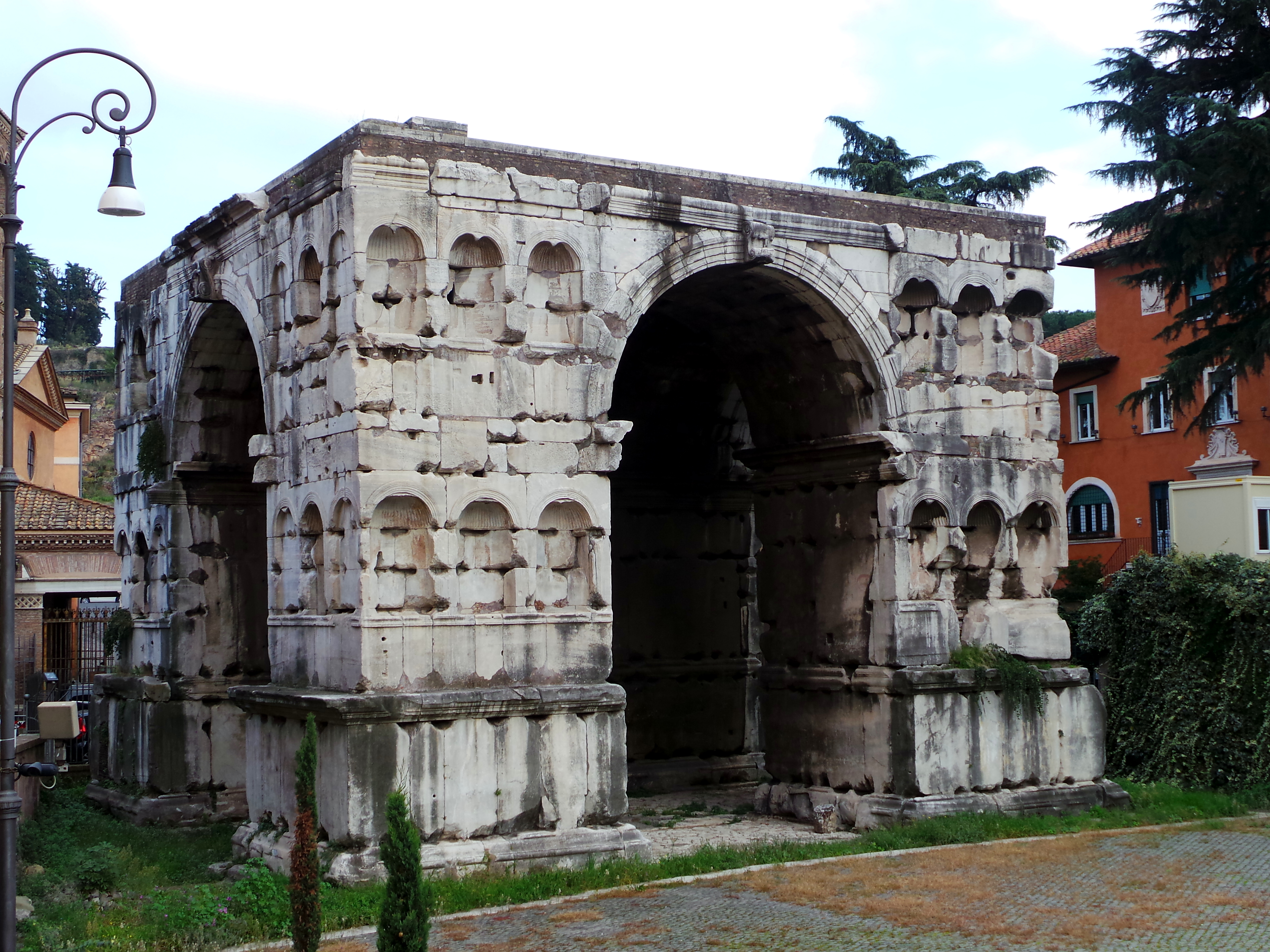 Der Janusbogen im November 2015